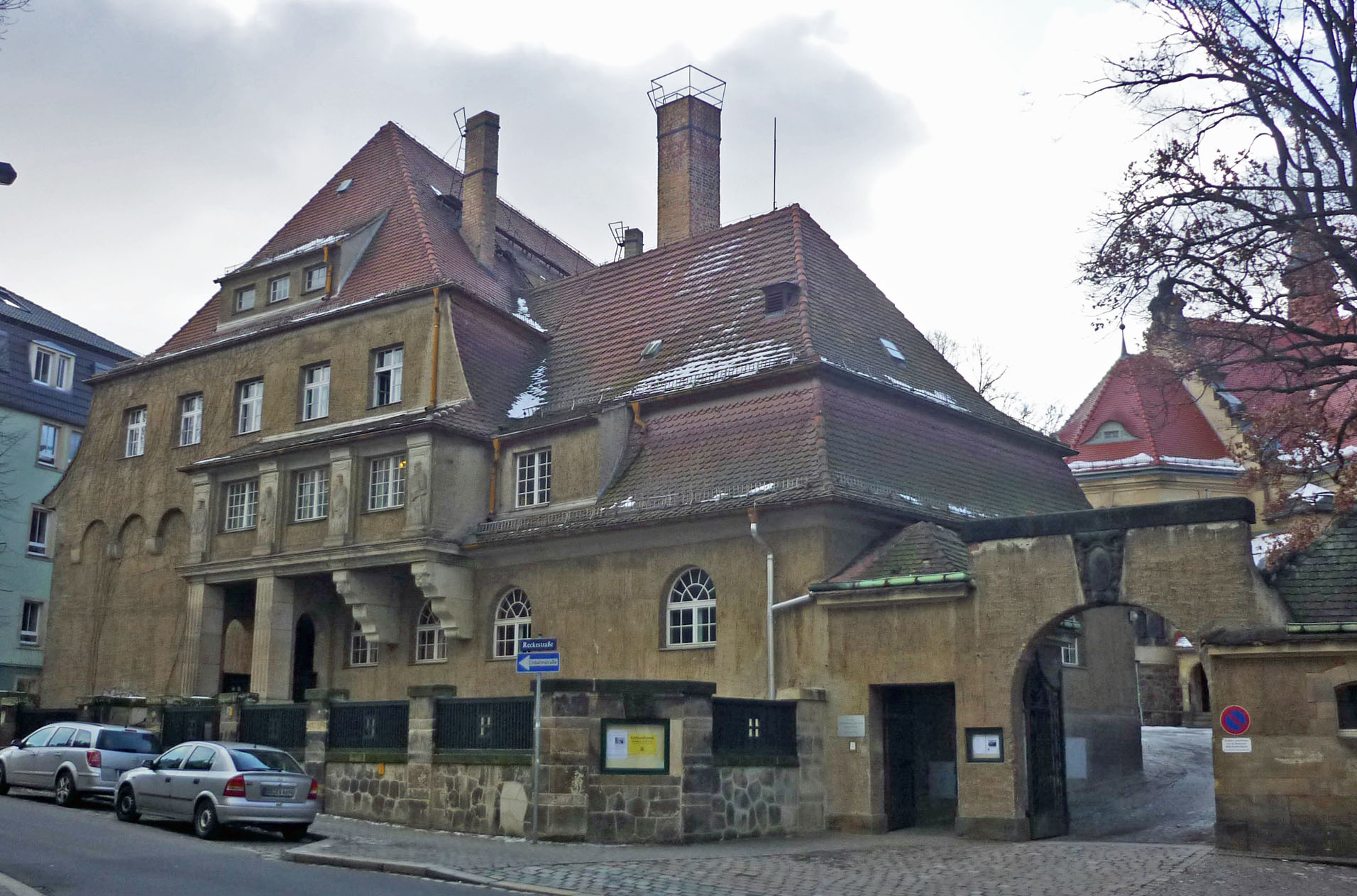 Gemeindehaus der Auferstehungskirche, Reckestr. 6 in Dresden-Plauen, errichtet 1911/12 von Max Wrba, Gebrüder Fichtner